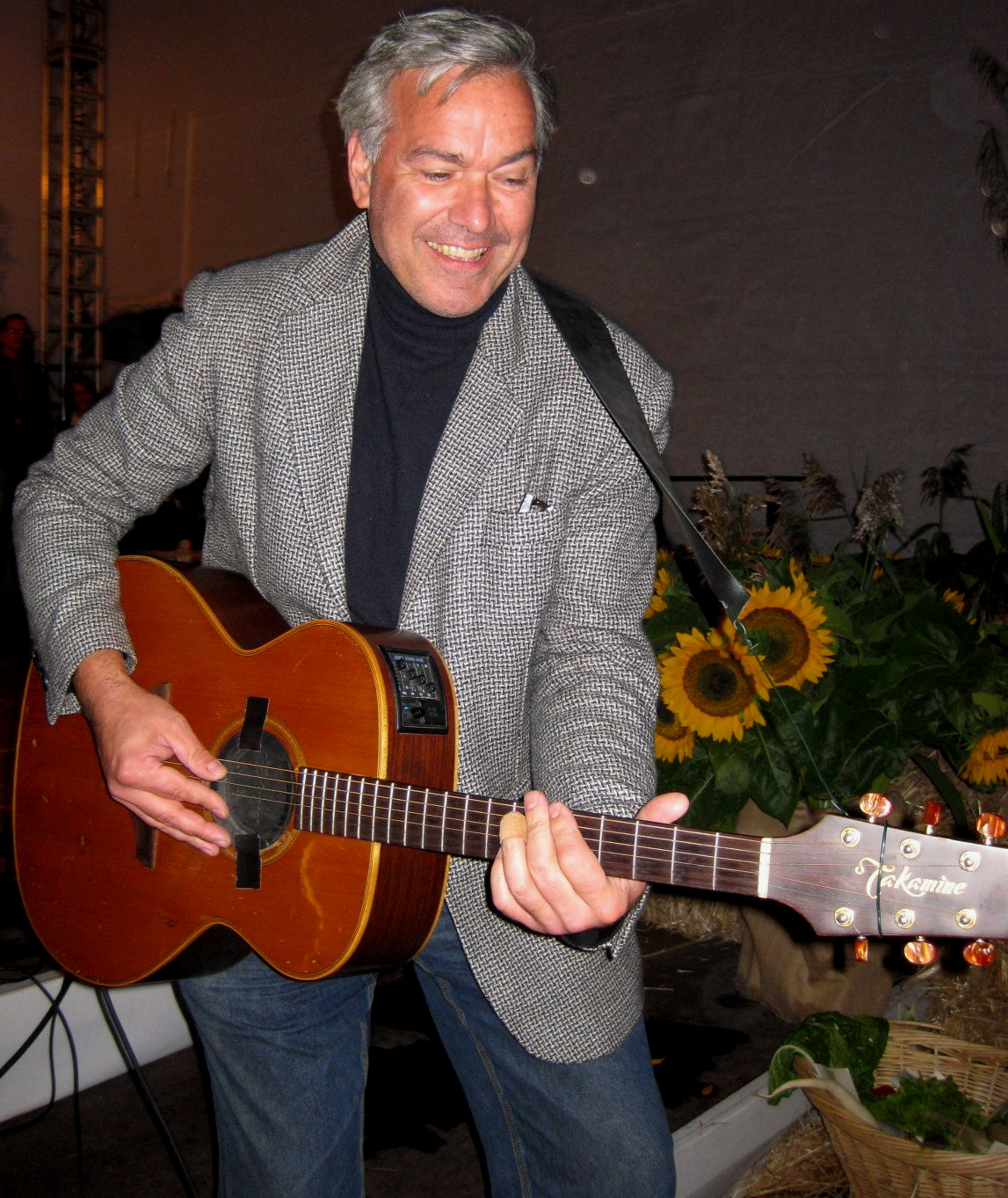 Stefan Gwildis bei einem Auftritt auf dem Hamburger Rathausmarkt